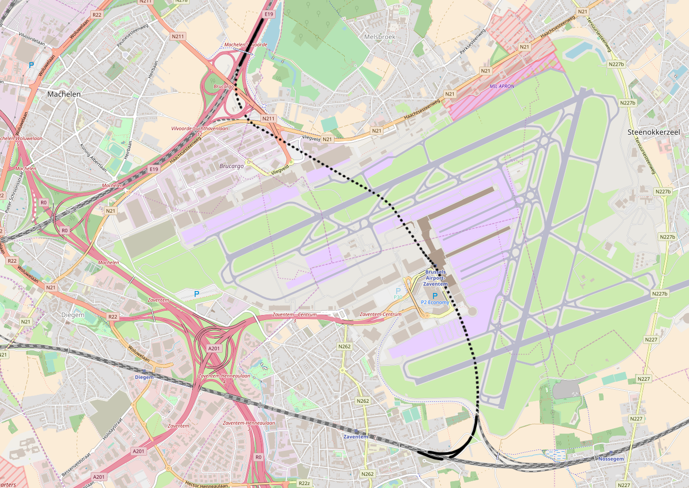 Belgian Railway Line 36C, Y Zaventem - Brussel-Nationaal-Luchthaven